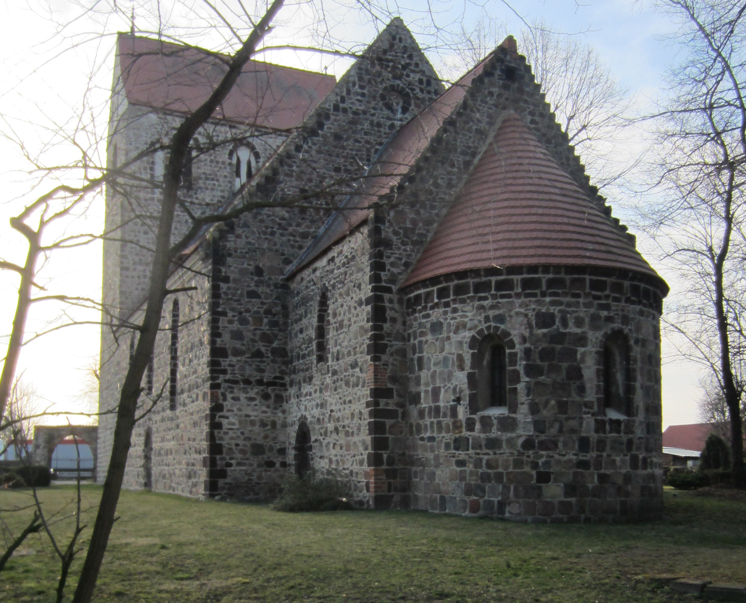 Riedebeck, Gemeinde Heideblick, denkmalgeschützte Dorfkirche, Ansicht von Osten